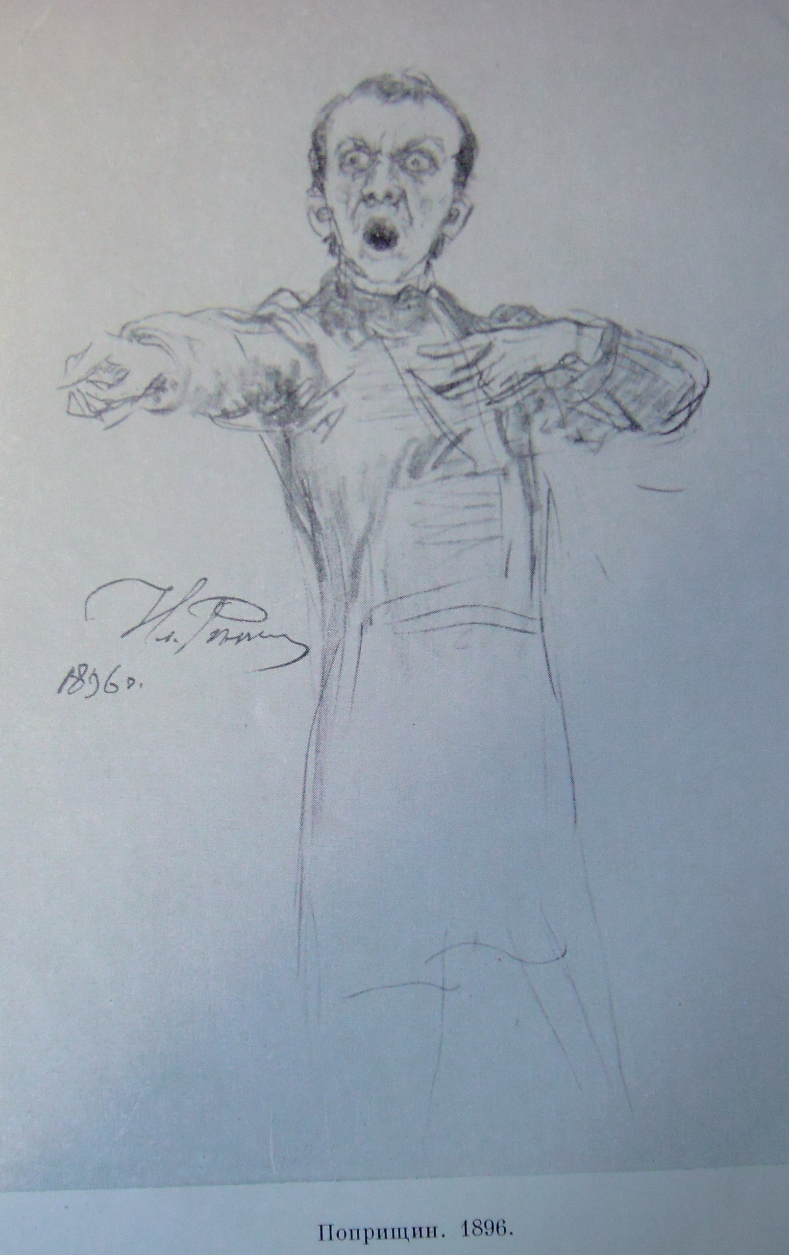 Актёр Василий Николаевич Андреев-Бурлак в роли Поприщина